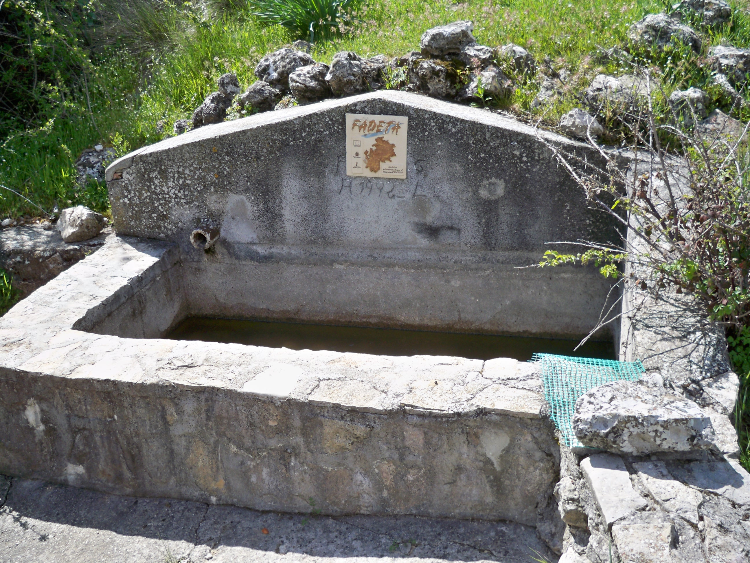 La fuente Pera en la actualidad